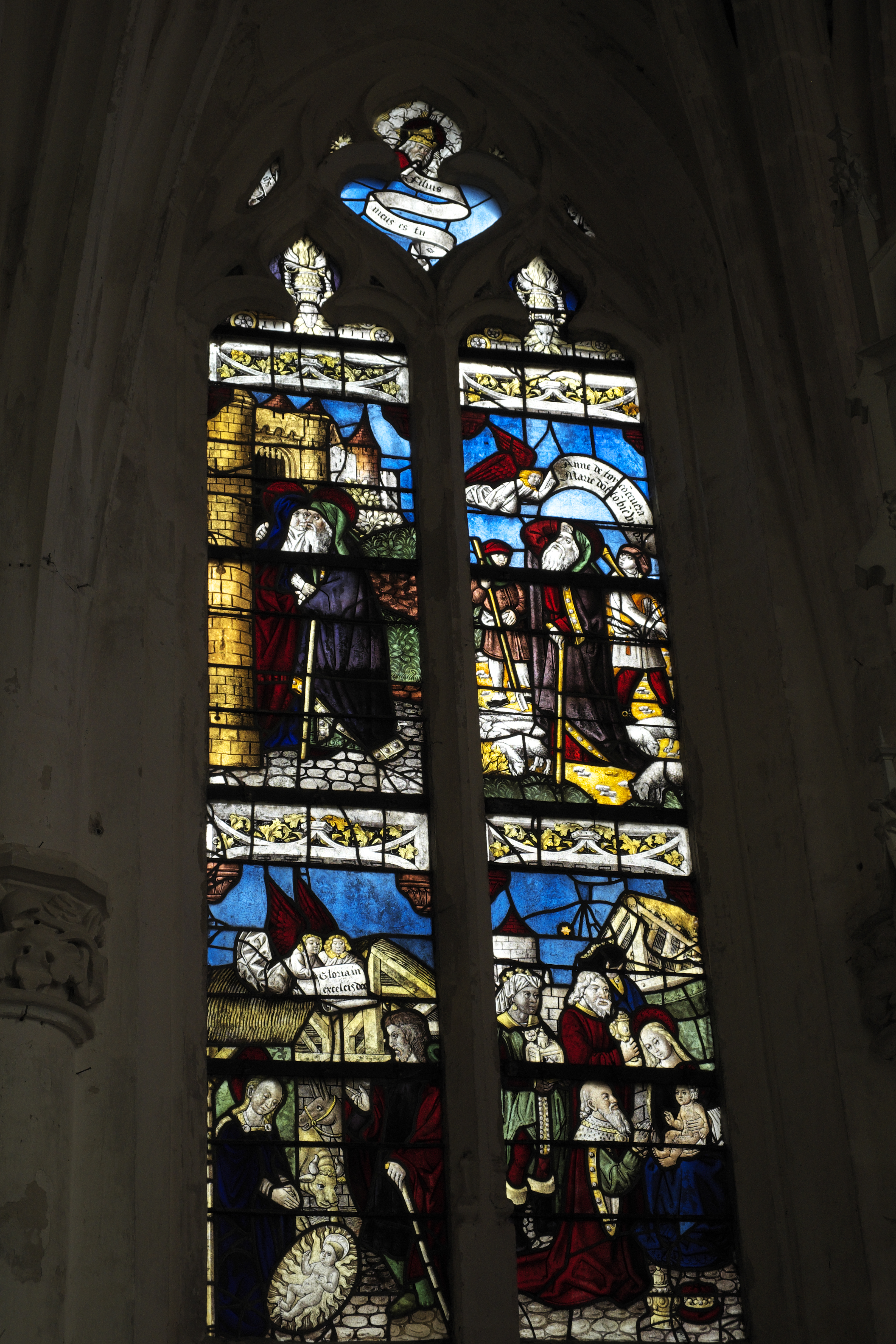 Katholische Kirche Notre-Dame-en-sa-Nativité in Puellemontier im Département Haute-Marne (Champagne-Ardenne/Frankreich), Bleiglasfenster aus dem 16. Jahrhundert; Darstellung: Begegnung Annas und Joachims an der Goldenen Pforte (links oben), Verkündigung an Joachim (rechts oben), Geburt Jesu (links unten), Anbetung der Heiligen Drei Könige (rechts unten) .